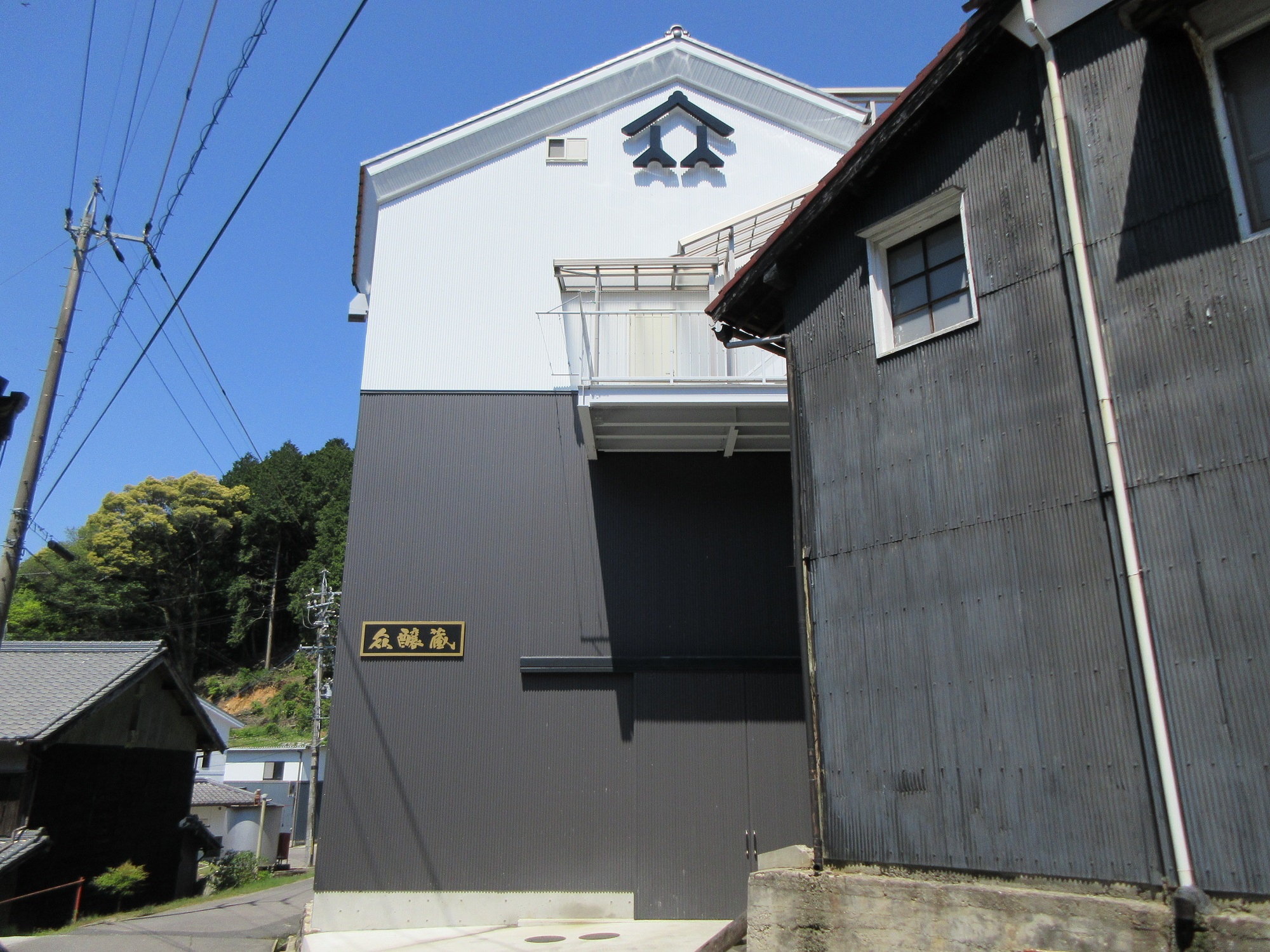 柴田酒造場（岡崎市保久町）